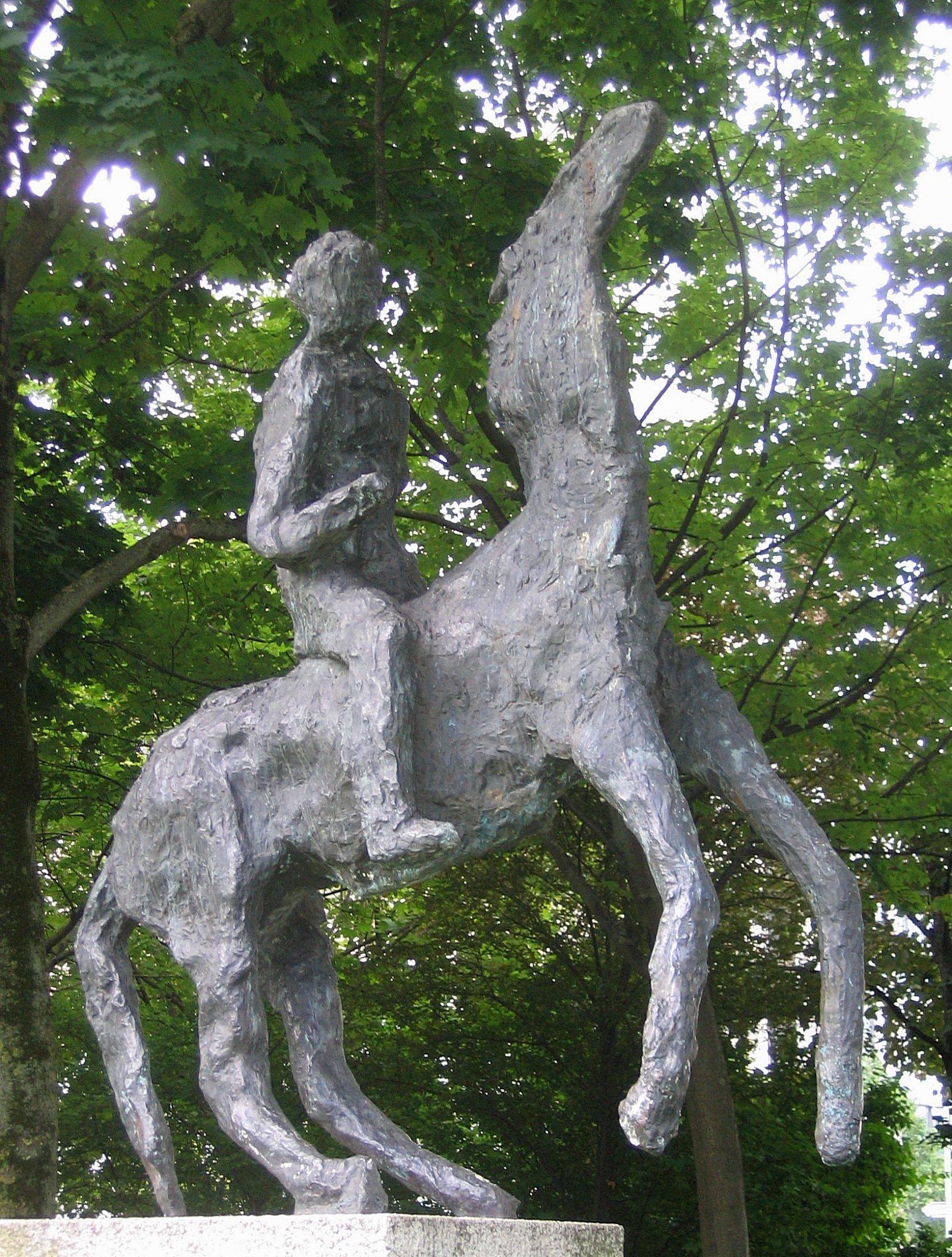 Alexander Fischer: Reiter, 1956, Heimeranplatz, München